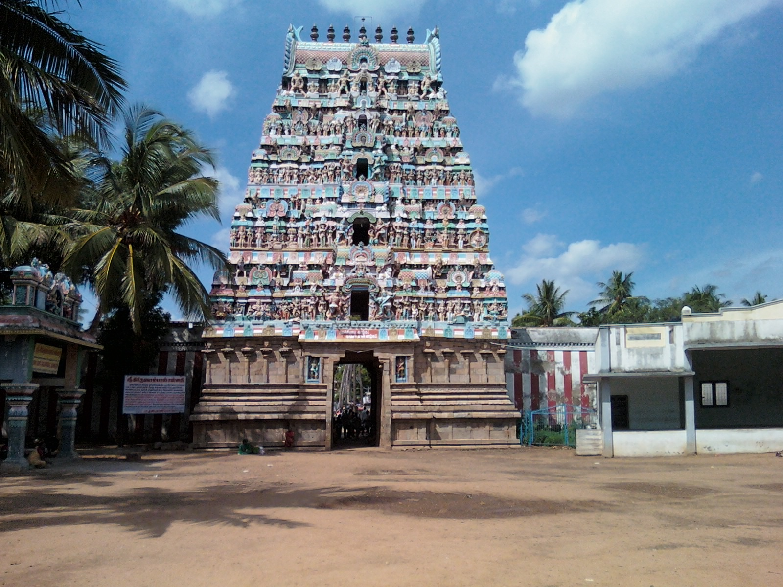 திருநாகேஸ்வரம் நாகநாத சுவாமி கோவிலில் மட்டுமே ஸ்ரீ ராகு பகவான் நாகவல்லி, நாககன்னி ஆகிய இரு தேவியர்களுடன் திருமணக் கோலத்தில் தனி சந்நிதி கொண்டு மங்கள ராகுவாக எழுந்தருளி காட்சி தருகின்றார்.